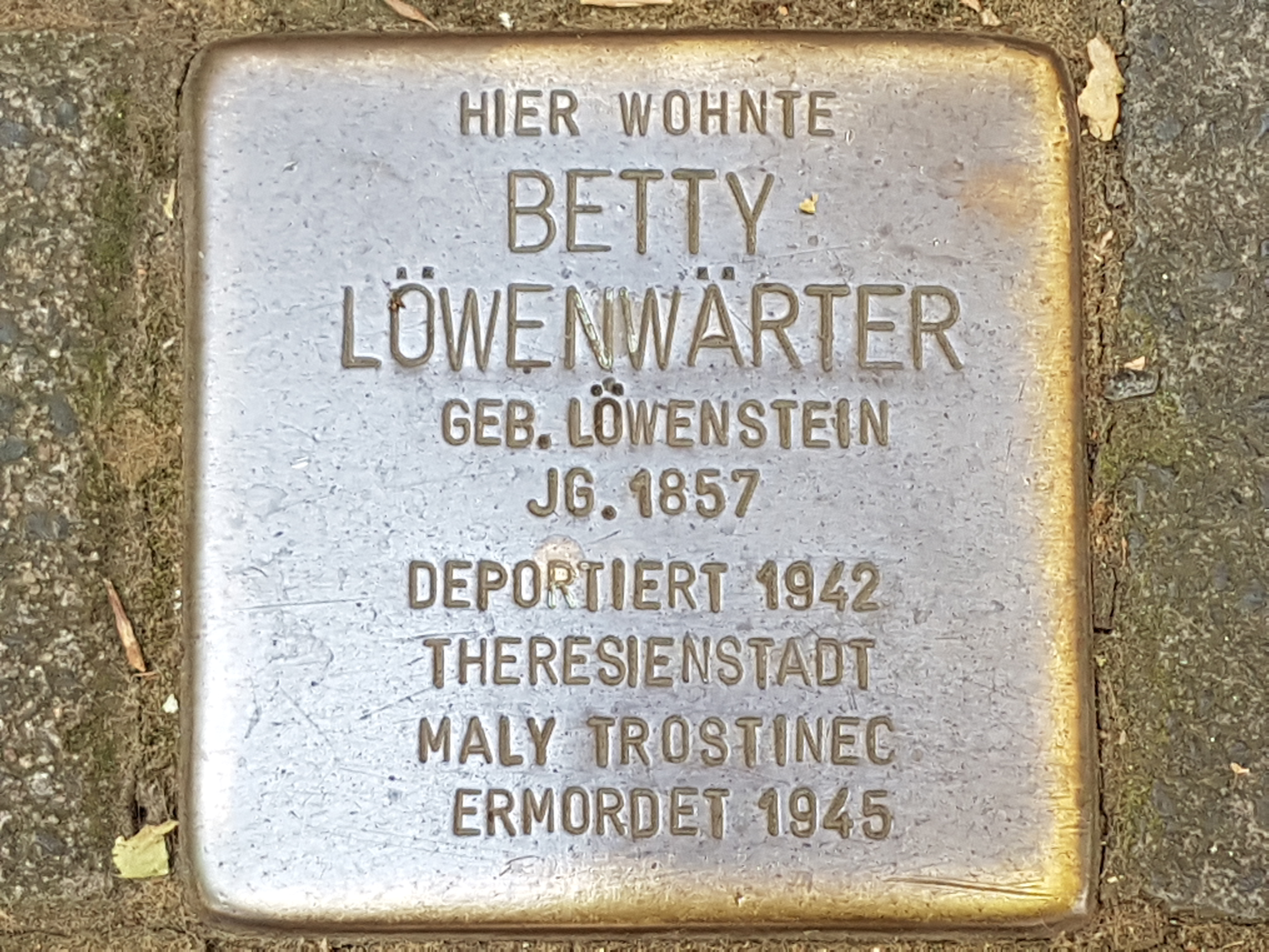 Stolperstein Duisburg